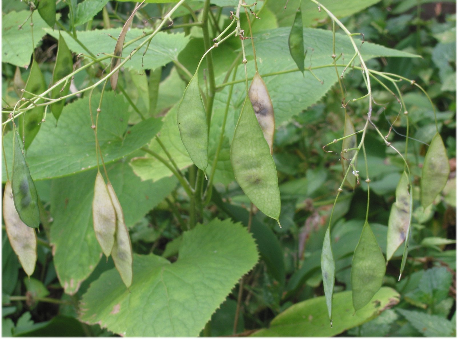 (nl: Vaste Judaspenning vruchten)Lunaria rediviva fruits